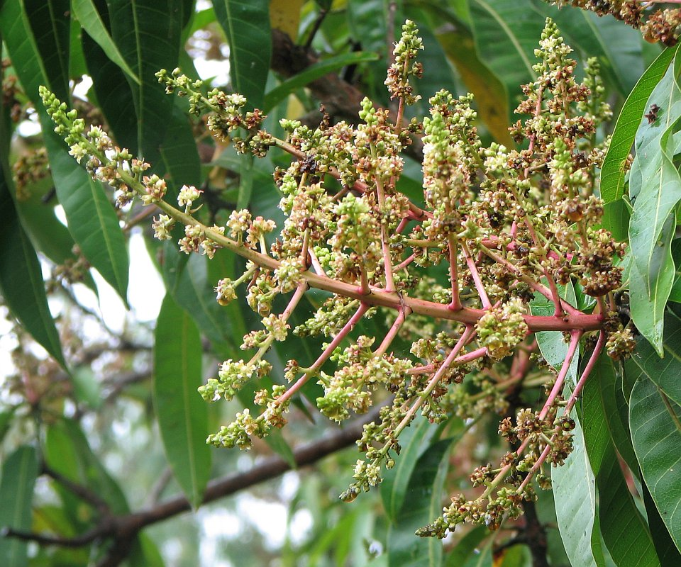 Mango flower